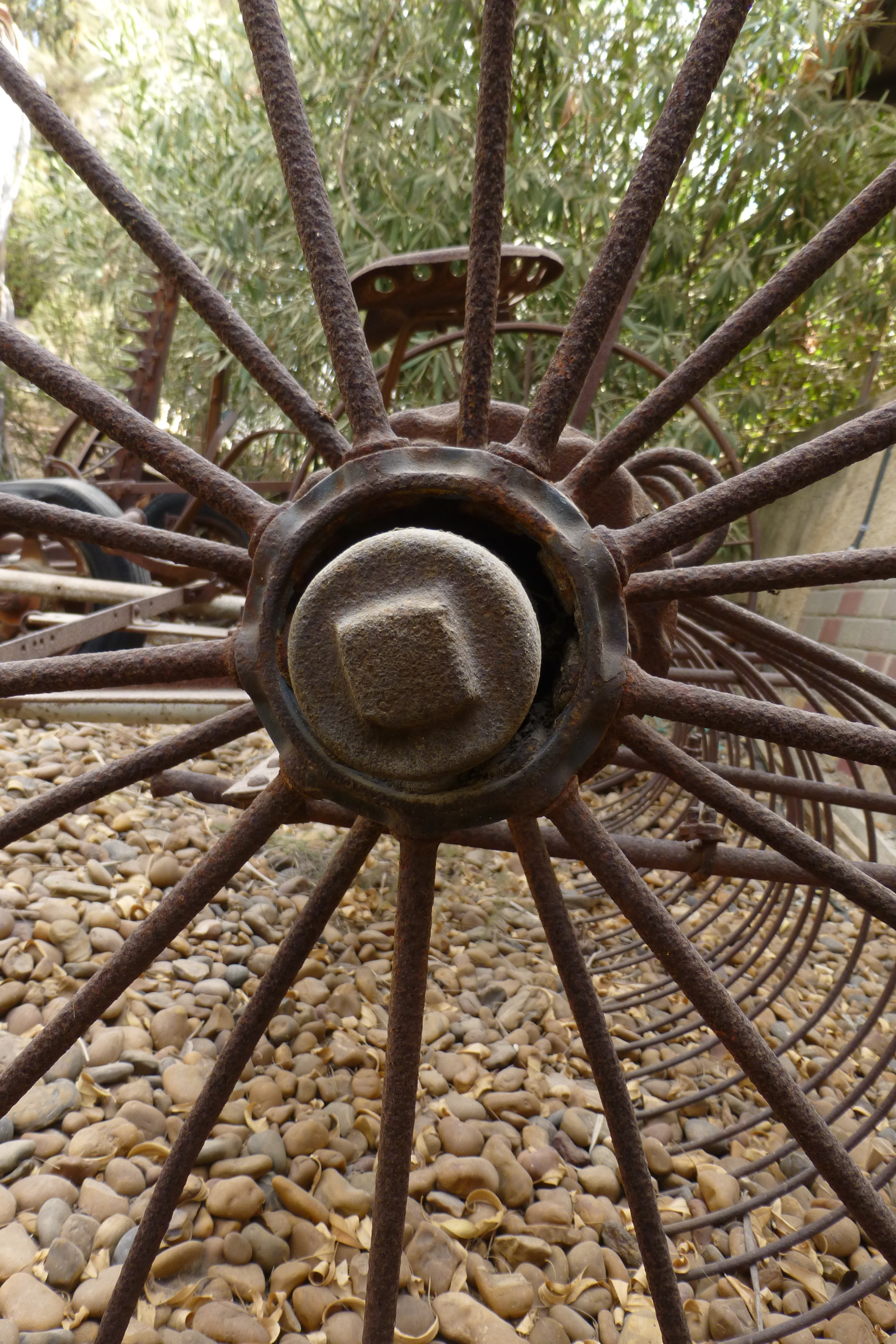 נבנה ב1924, על ידי משה ורחל מינץ. שימש בחלקו המערבי כבית מגורים ובחלקו המזרחי כבית עם. כיום הוא משכנו של מוזיאון לתולדות גדרה והביל"ויים.